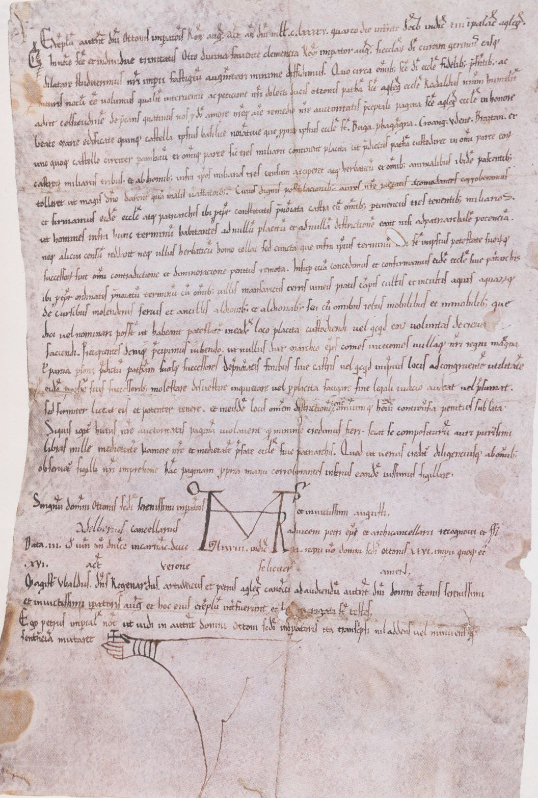 Scannerizzazione del diploma dell'imperatore Ottone II datato 983